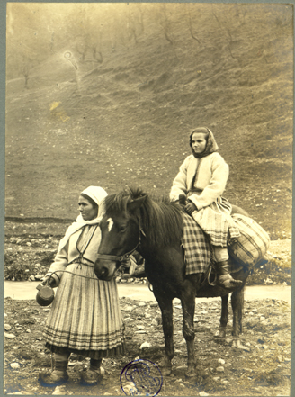 Adler - Ţărănci din Vulcan, jud. Hunedoara 3